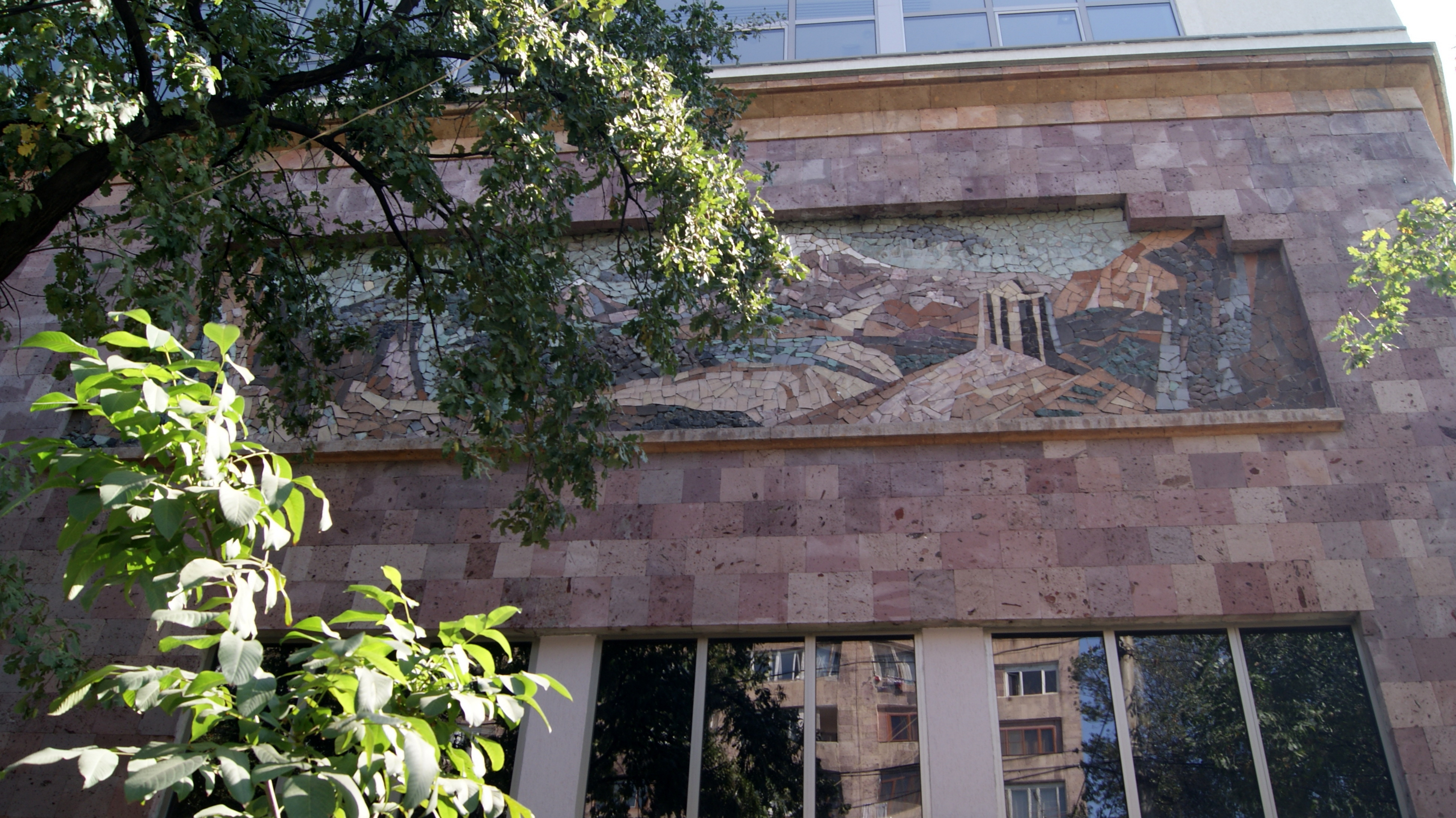 Մարտիրոս Սարյանի տուն-թանգարան 6/175